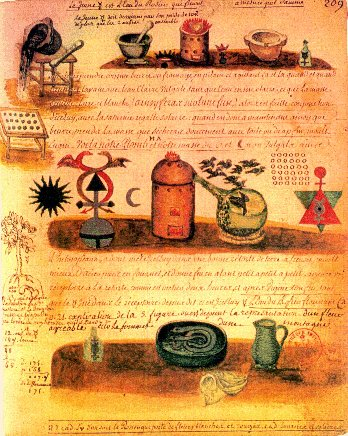 extrait de l'Alchimie de Flamel, par le Chevalier Denys Molinier "pensionnaire du Roy, amateur de la Science hermétique"